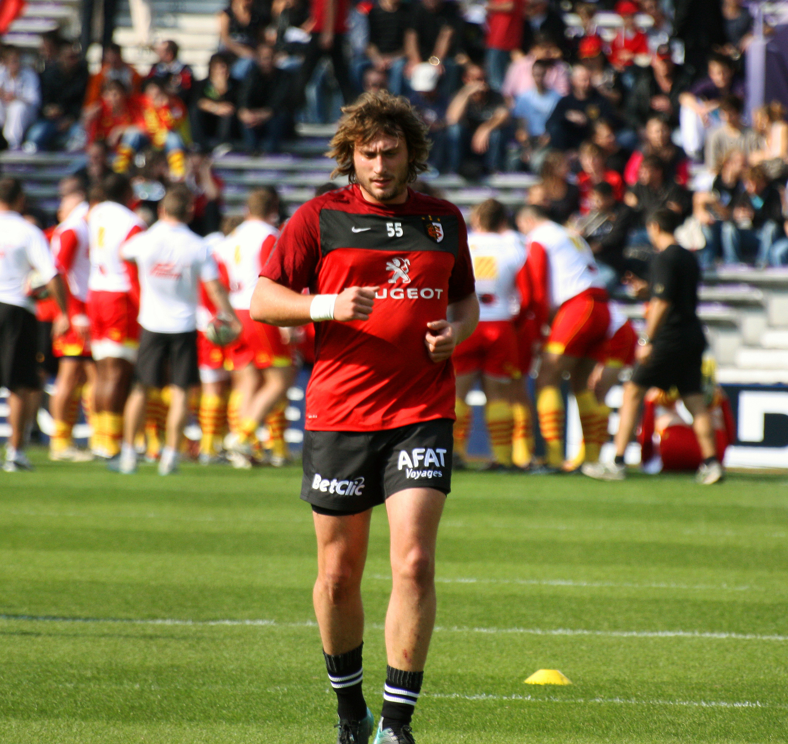 Maxime Medard à l'entrainement